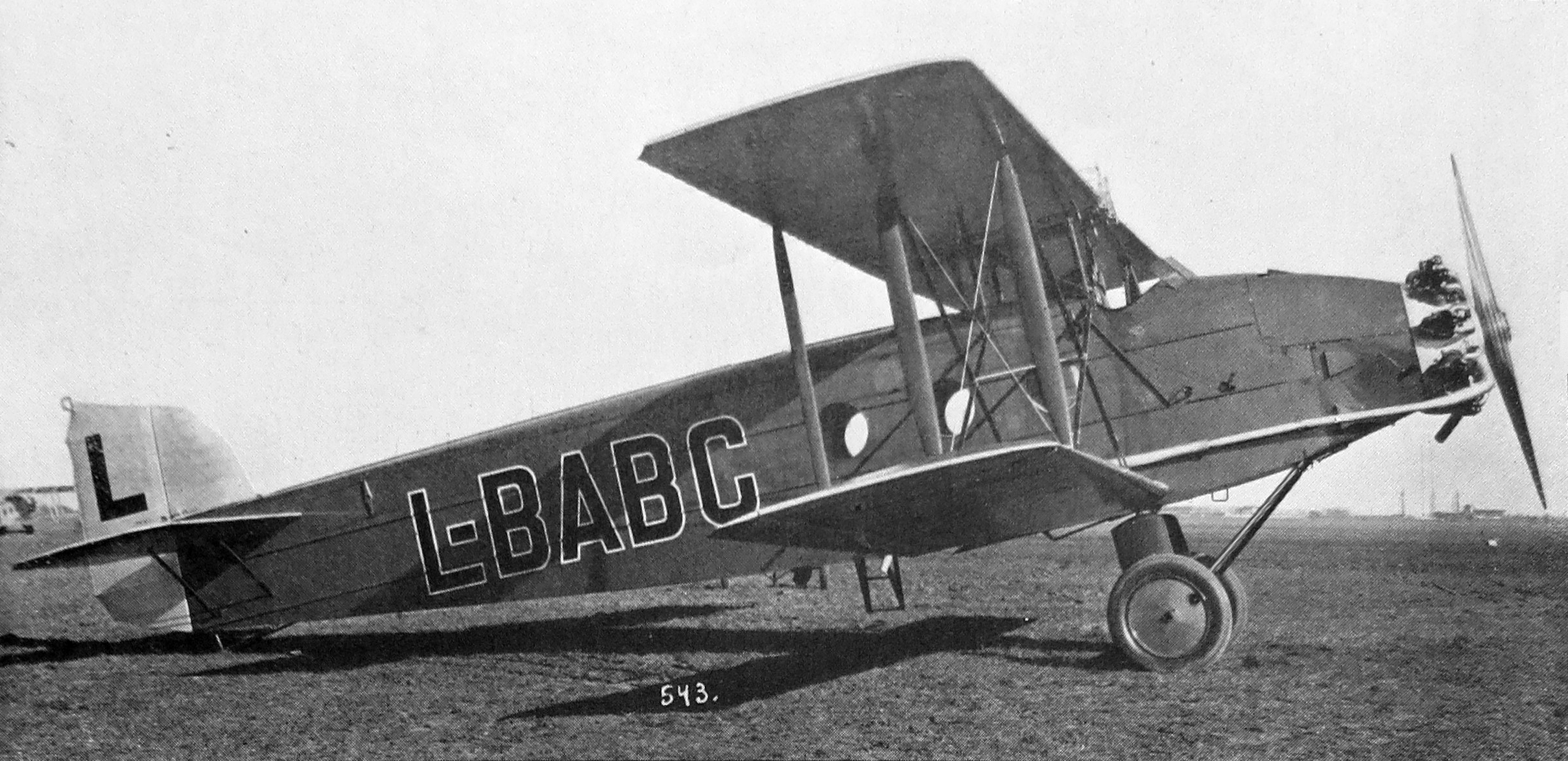 Avia BH-25 s motorem Jupiter IV